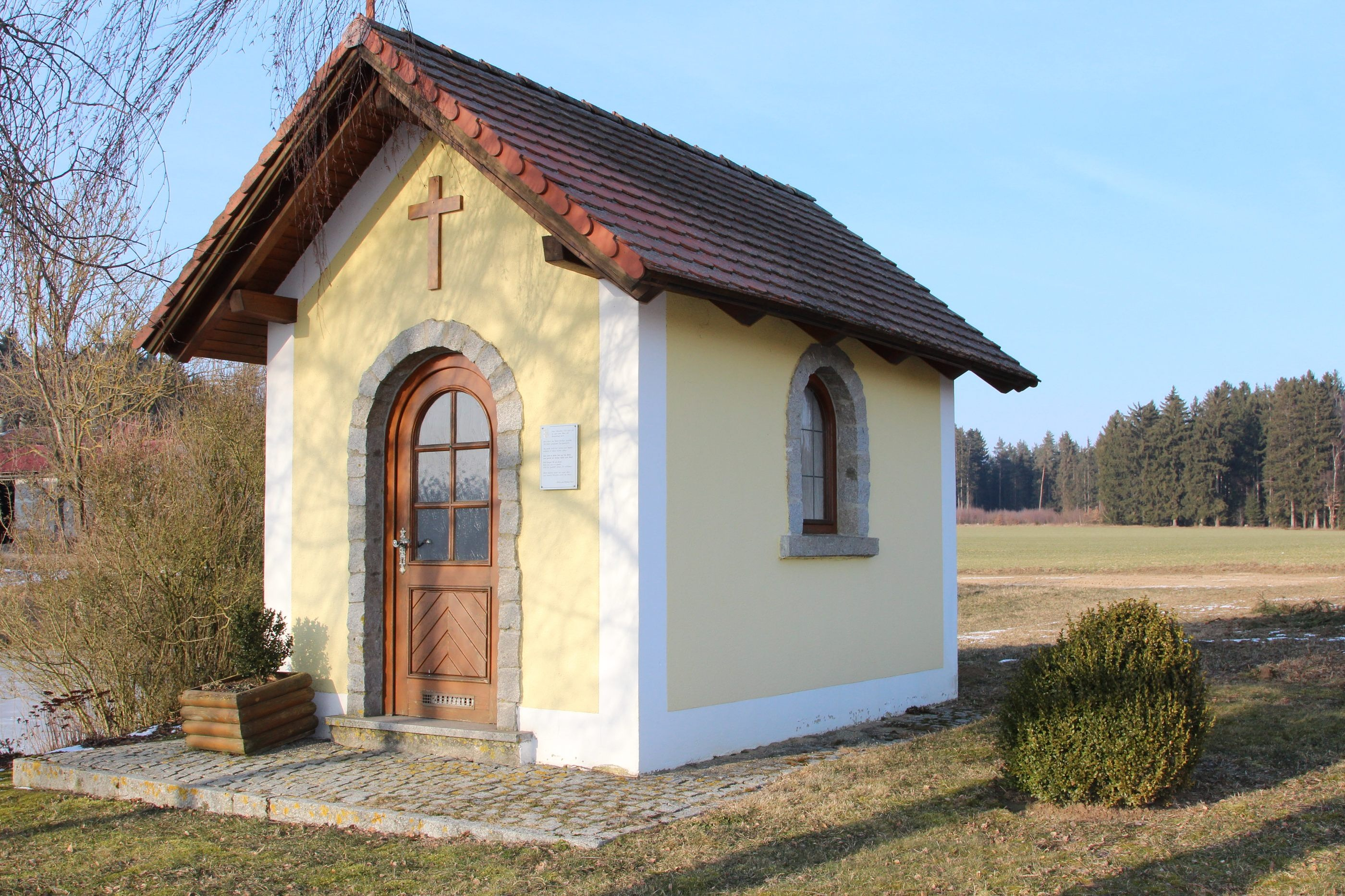 Kapelle beim Fischerhof